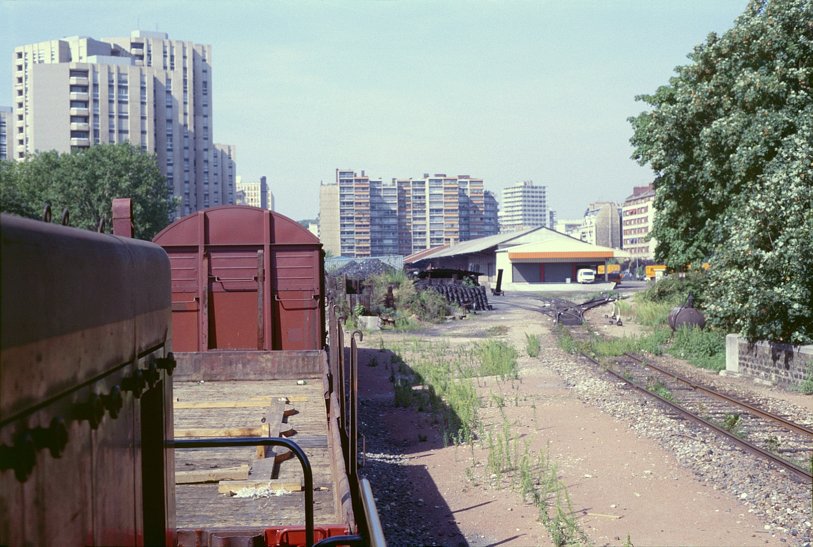 Un train de desserte marchandises quitte la gare de la Glacière-Gentilly, sur la Petite Ceinture de Paris le 9 août 1985.